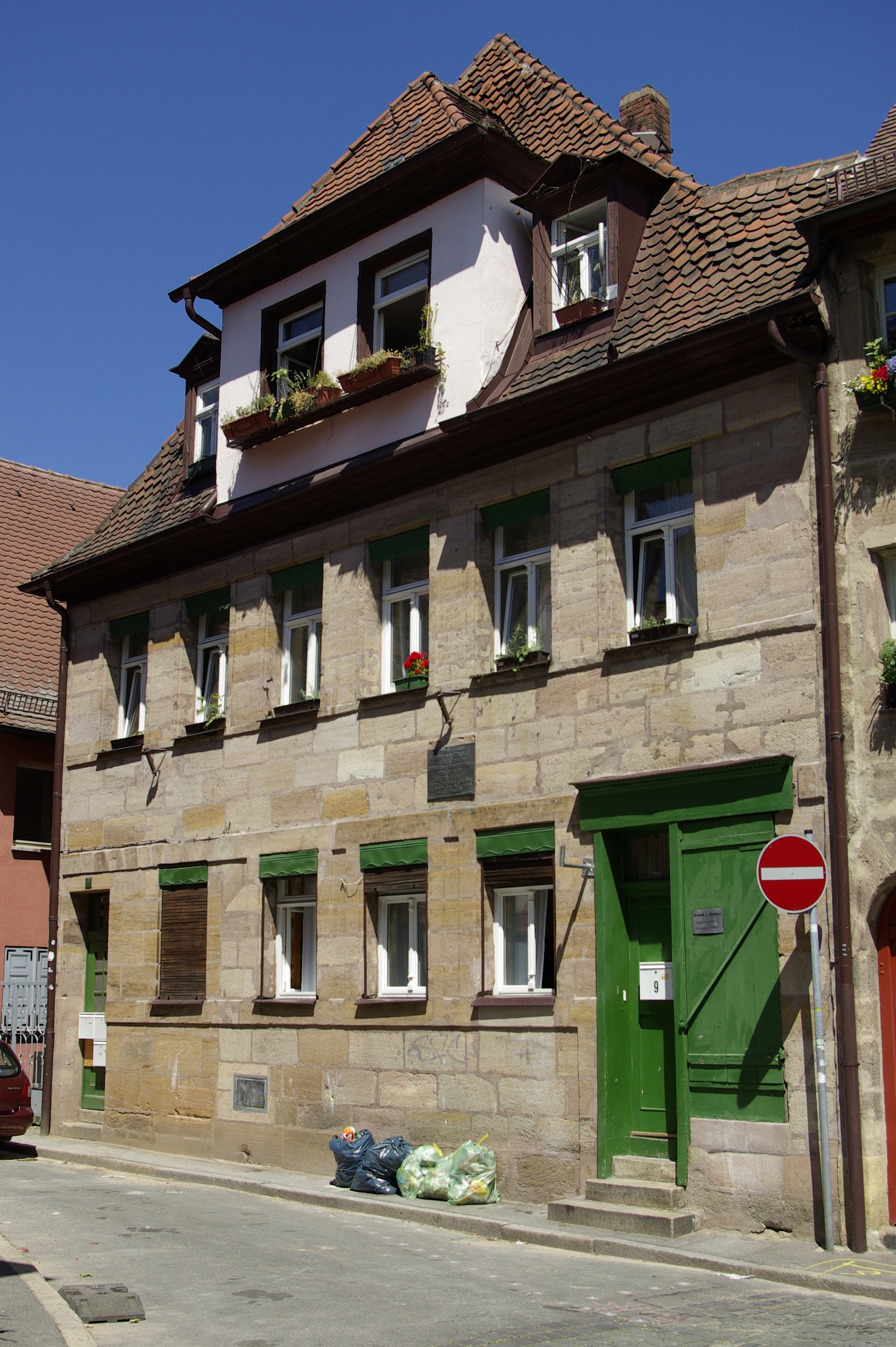 Helmstraße 9 in Fürth.